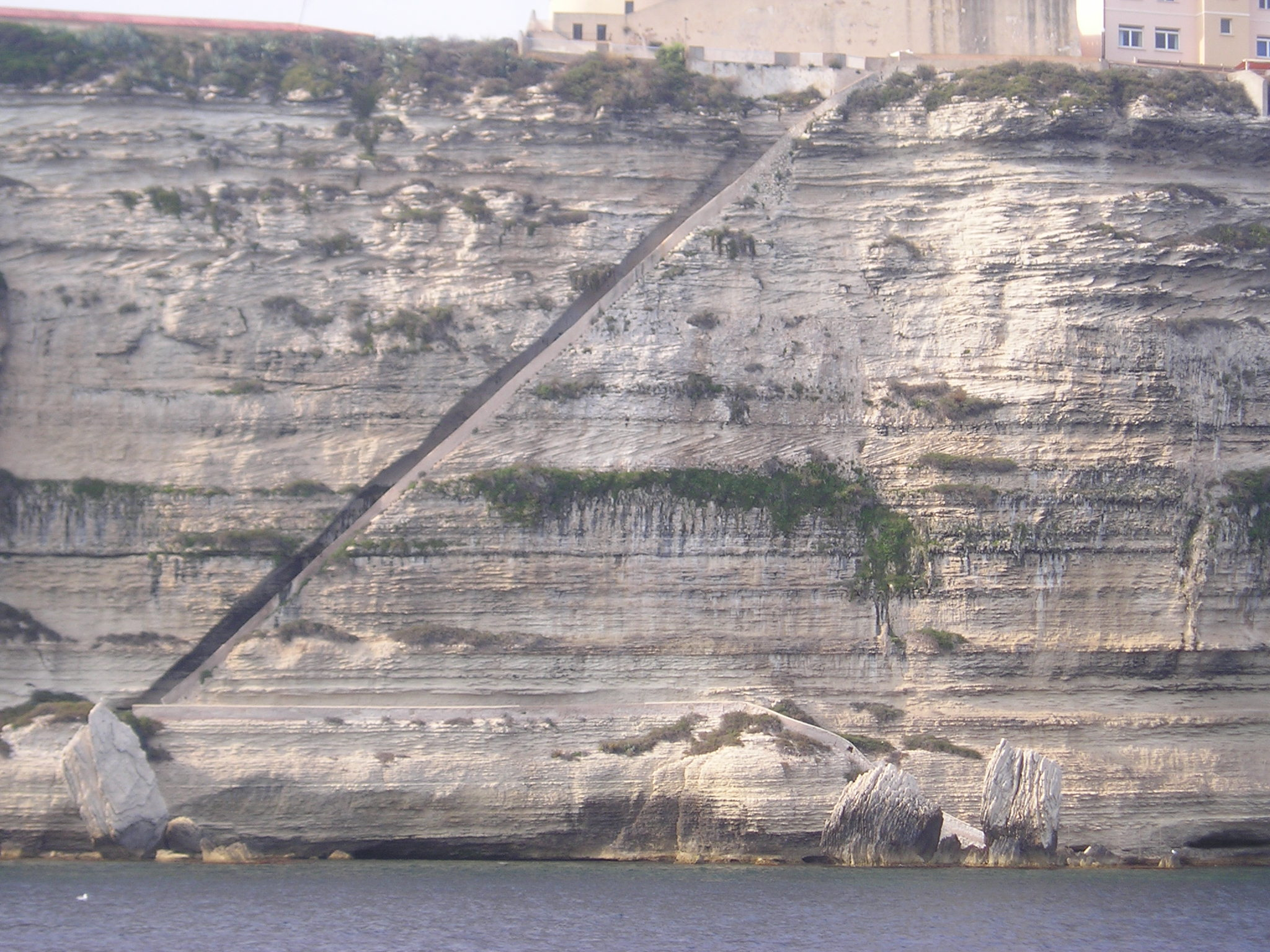 Escalier du Roi d'Aragon